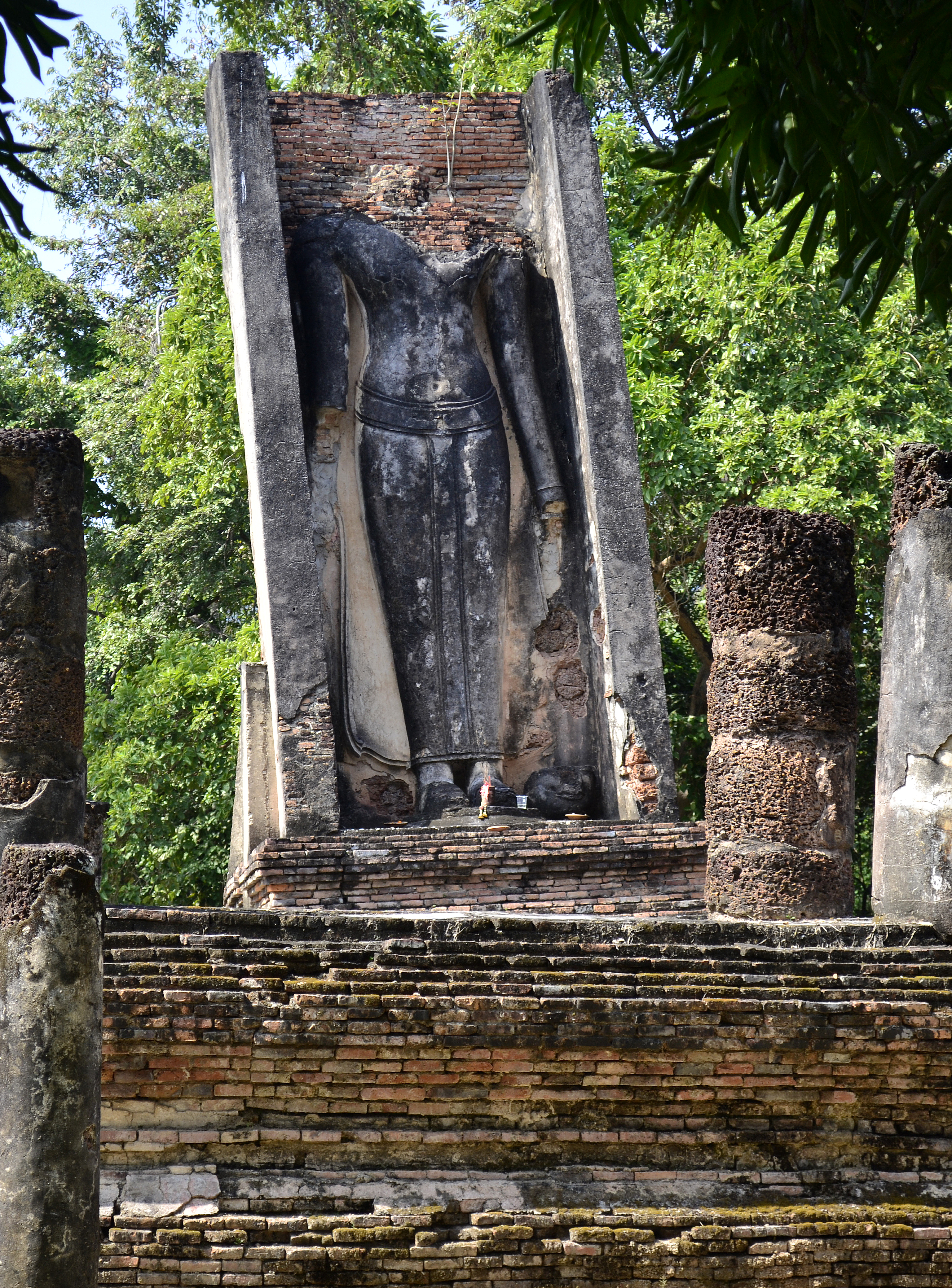 Wat Phra Yuen im Geschichtspark Sukhothai